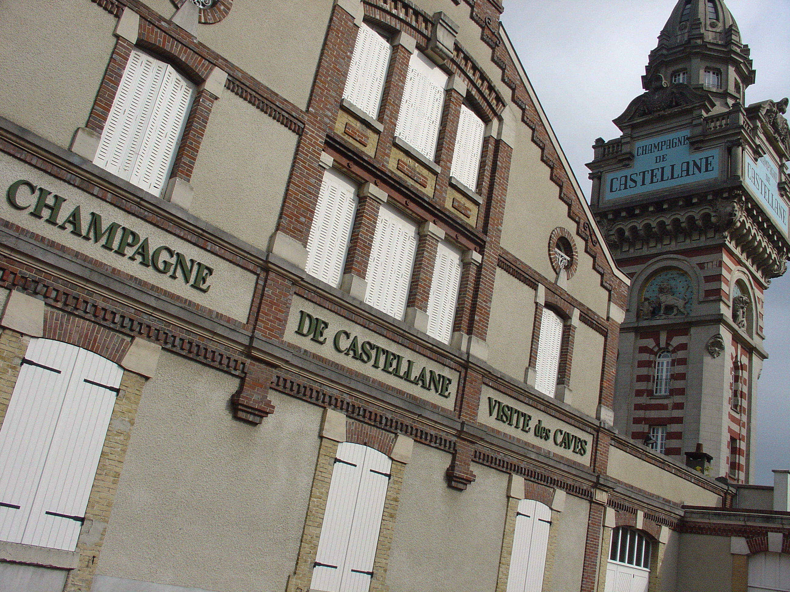 Castelane te Epernay